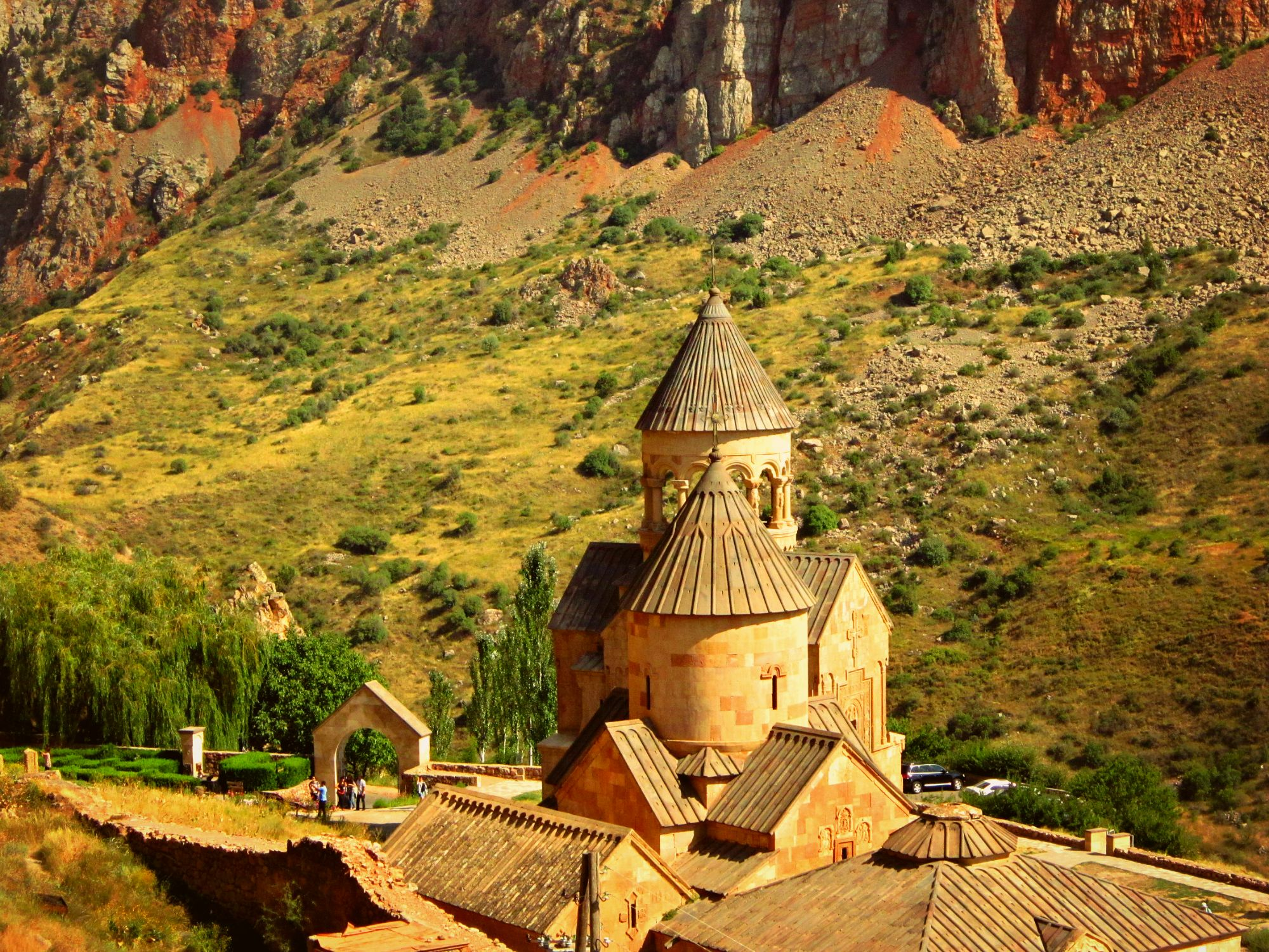 Նորավանք 8.1/1